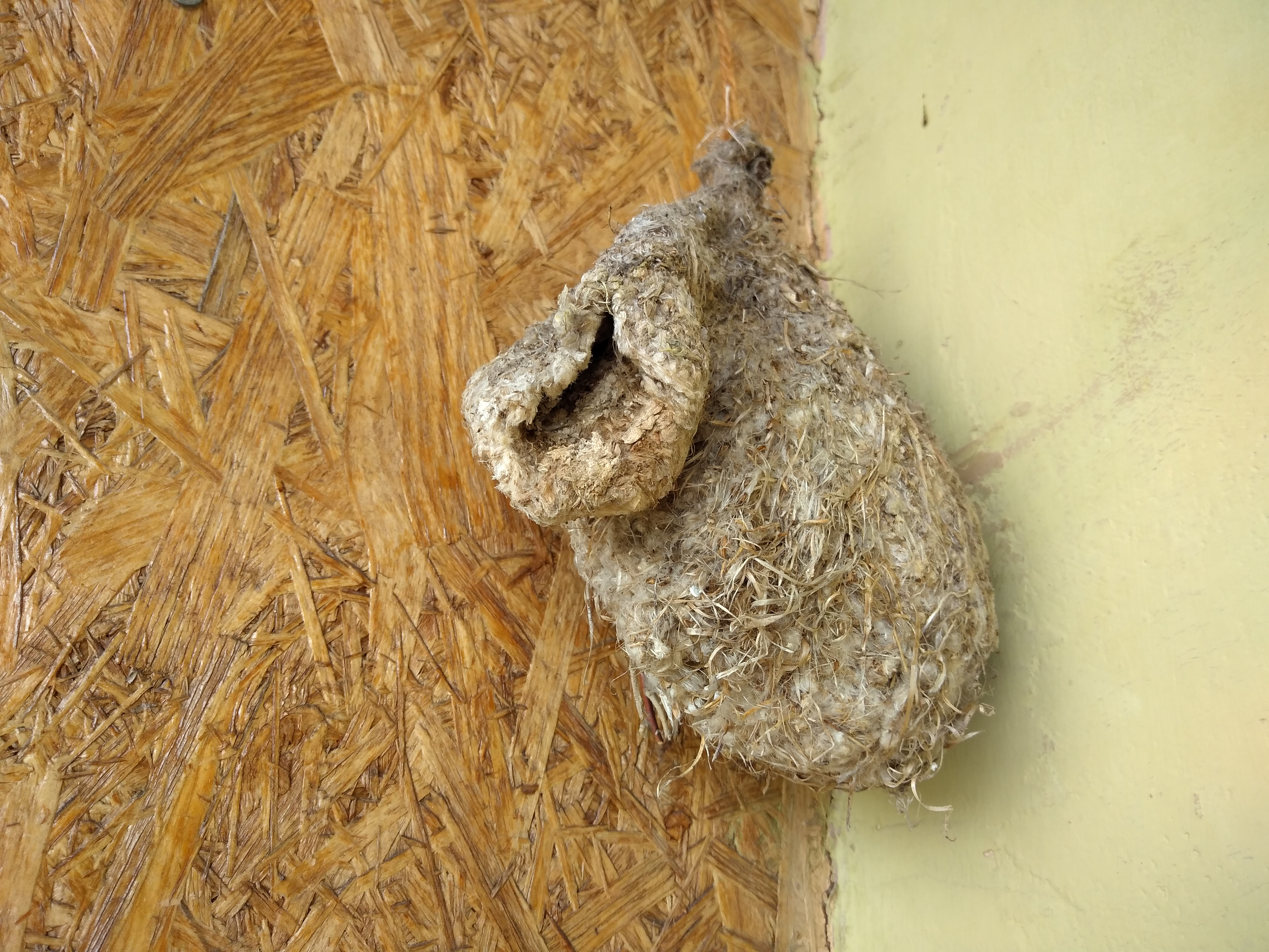 Гніздо підібрано взимку на землі - обірвалося від вітру.